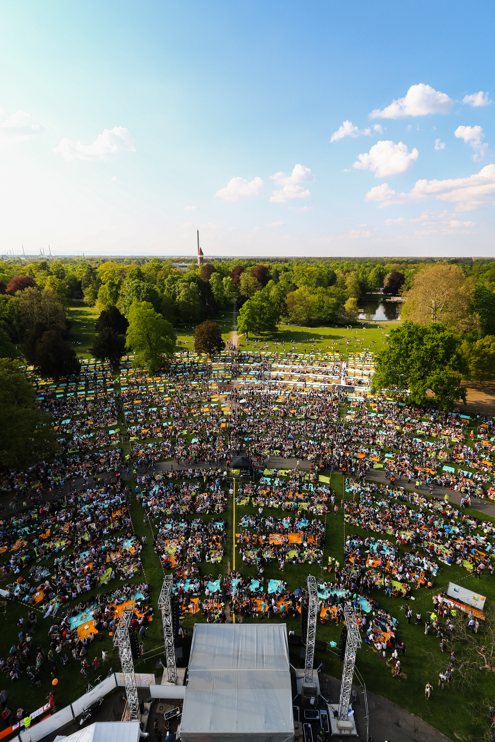 Christival: Veranstaltung auf dem Freigelände